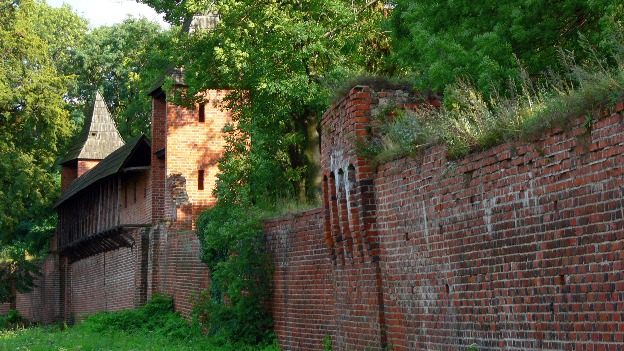 Środa Śląska, mur miejski, XIII-XIV w.